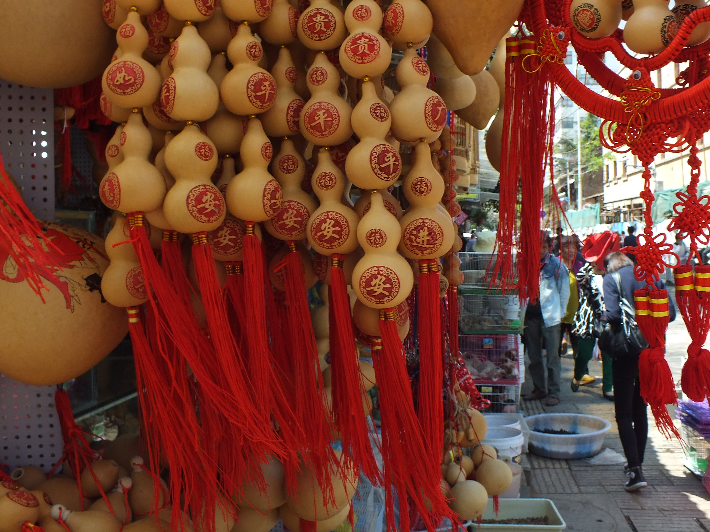 2015-03-20 Wuhua District, Yunnan, Kunming(雲南省昆明市五華区, 中国) 光華街